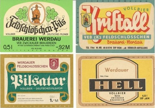 Flaschenetiketten der ehemaligen "Feldschlösschen" - Brauerei in Werdau (Sachsen). Es handelt sich um historische Etiketten aus der Zeit der DDR.